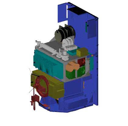 TERRIERS satellite